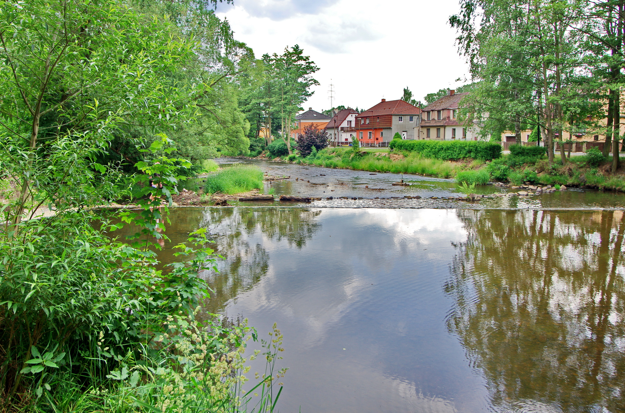 jez na řece Svatava v obci Svatava, okres Sokolov